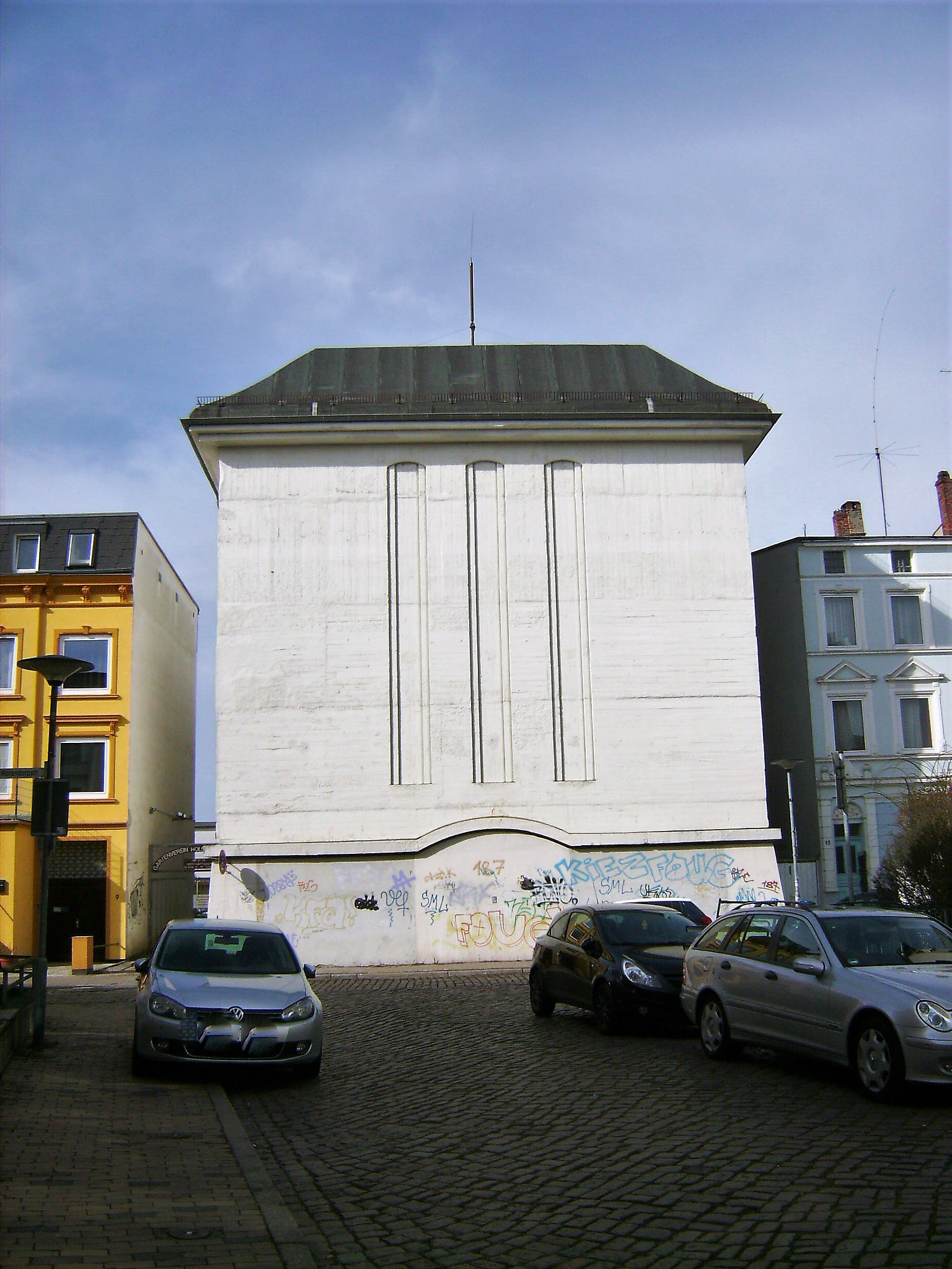 Bunker Warendorpstrasse Vorderseite